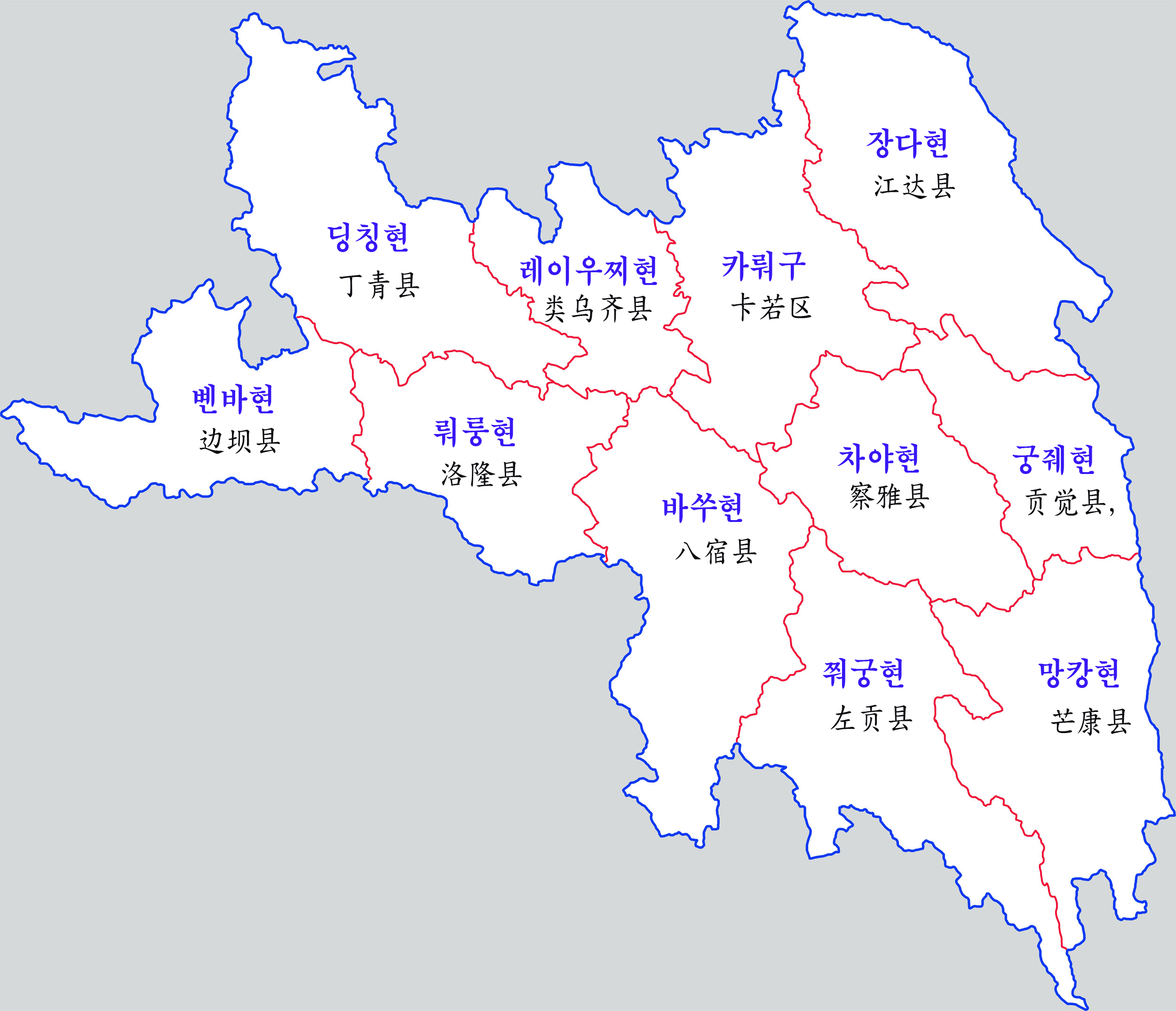 창두시 행정구역